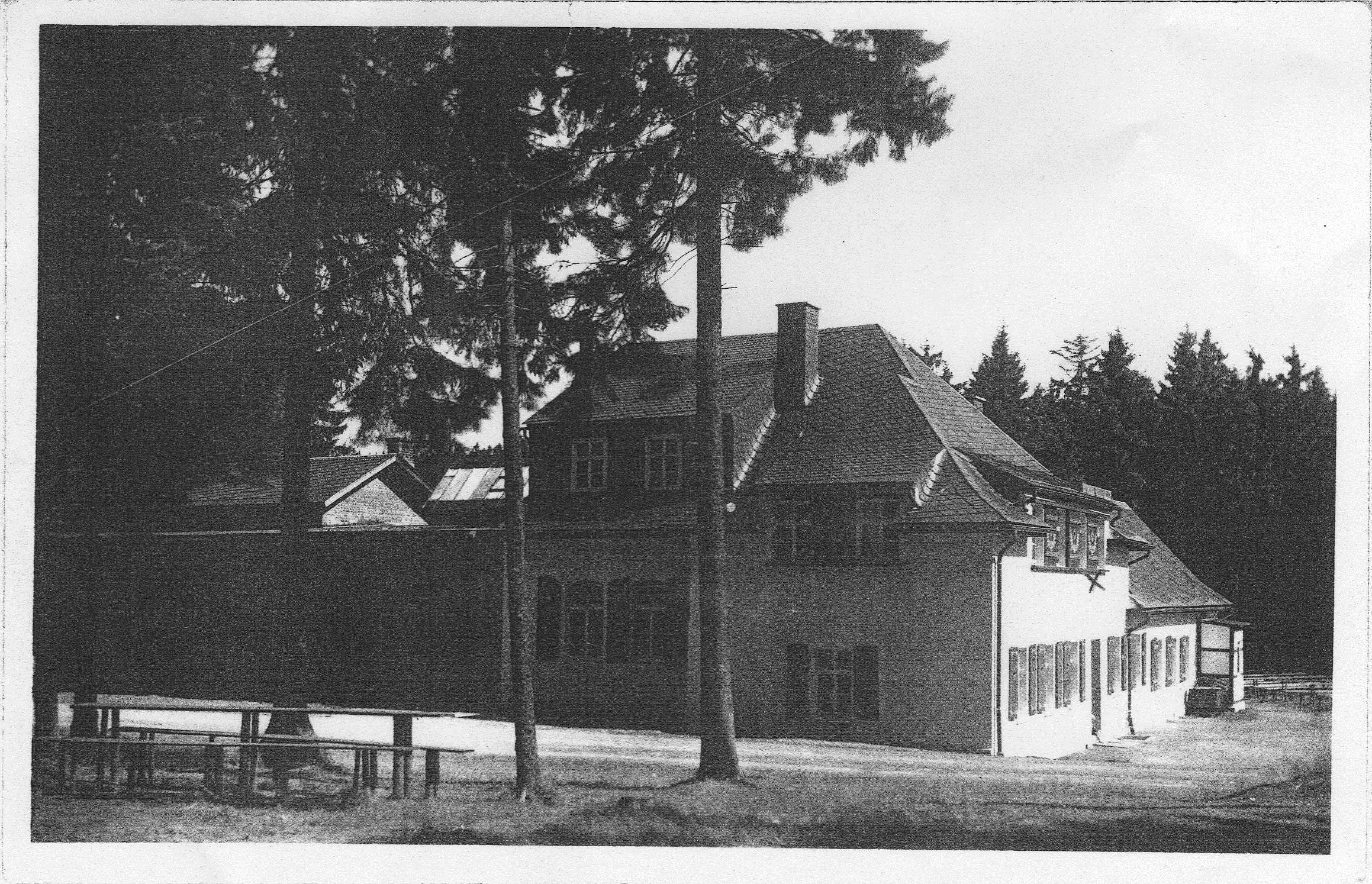 Bild vom Hauptgeäude ca. in den 1930er jahren